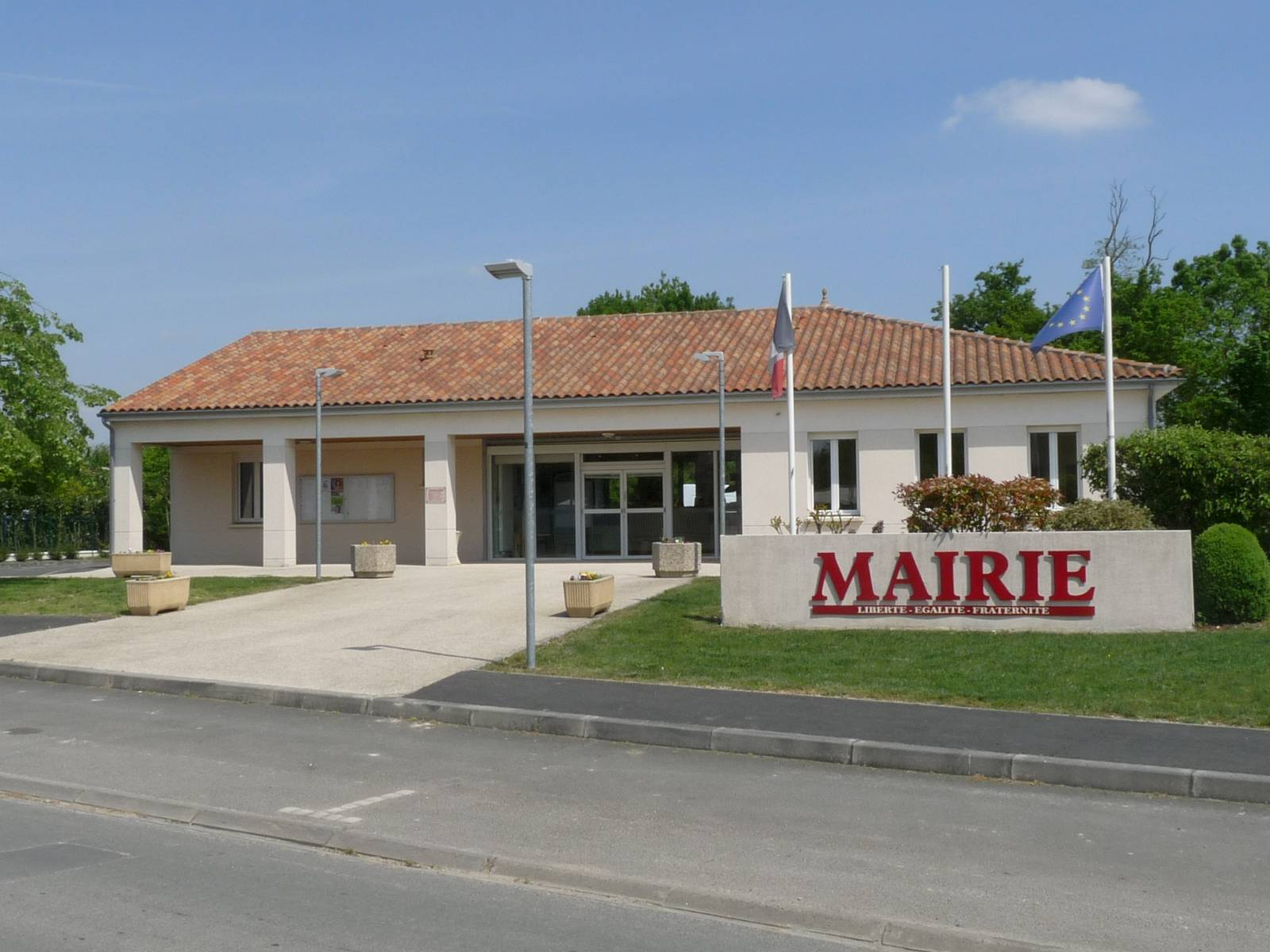 Mairie de Nercillac, Charente, France